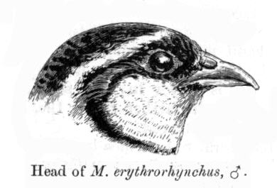 Perdicula erthyrorhyncha